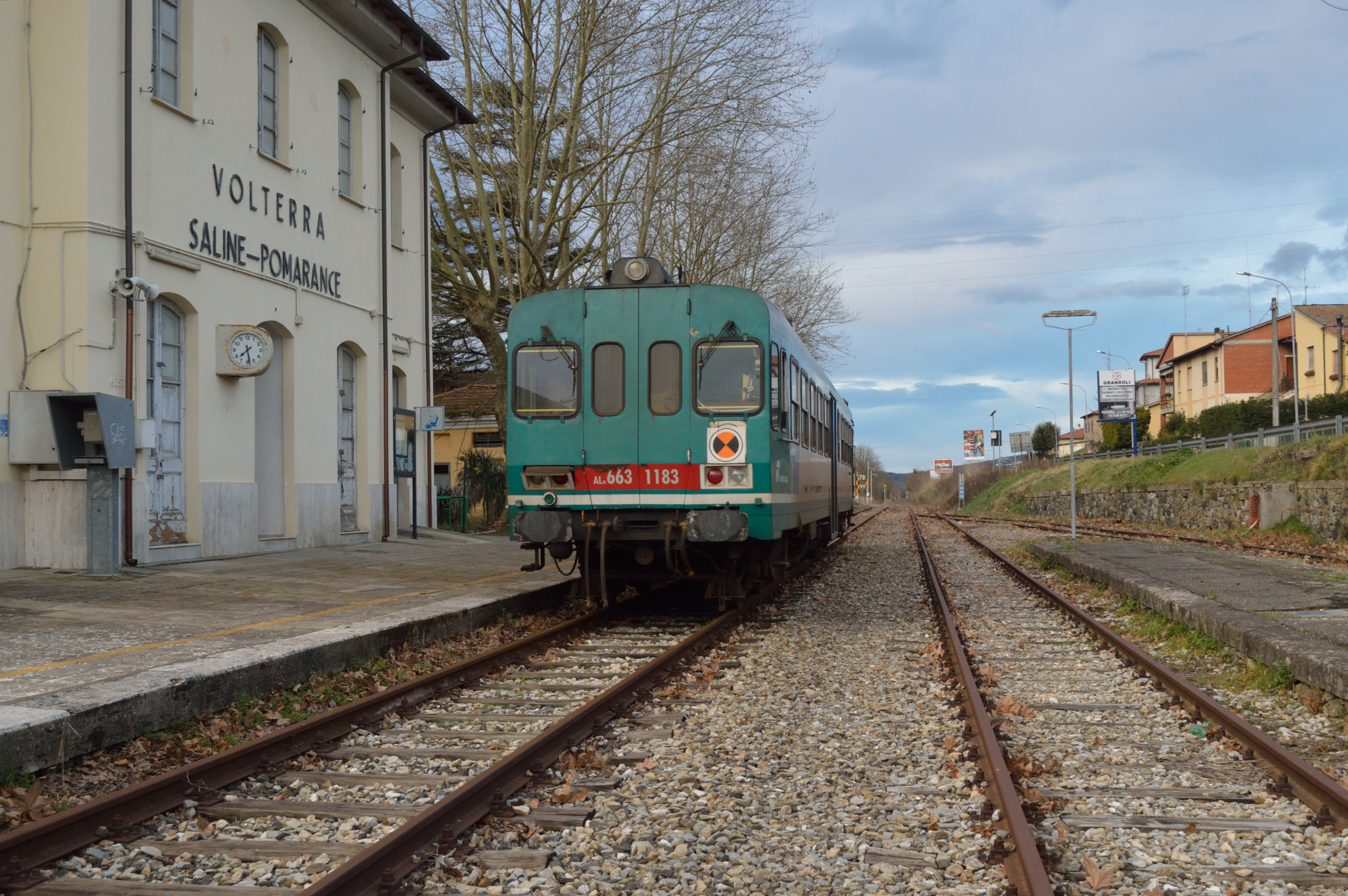 Stazione di Volterra-Saline-Pomarance. È in sosta l'automotrice termica ALn 663.1183 delle Ferrovie dello Stato, dopo aver effettuato il regionale 6941 delle 5.39 da Pisa Centrale.